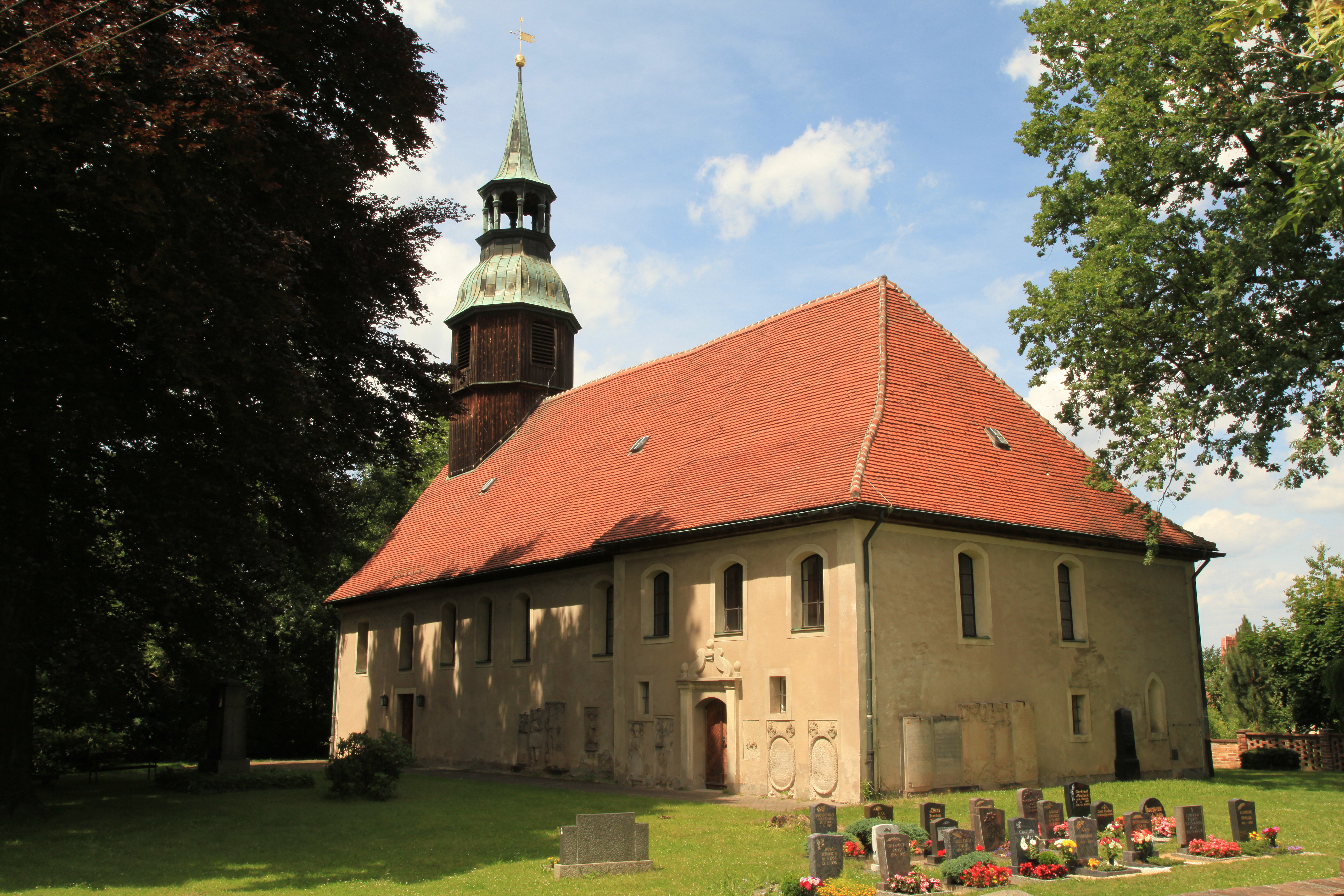 Kirche und Friedhof an der Quolsdorfer Straße in Hähnichen